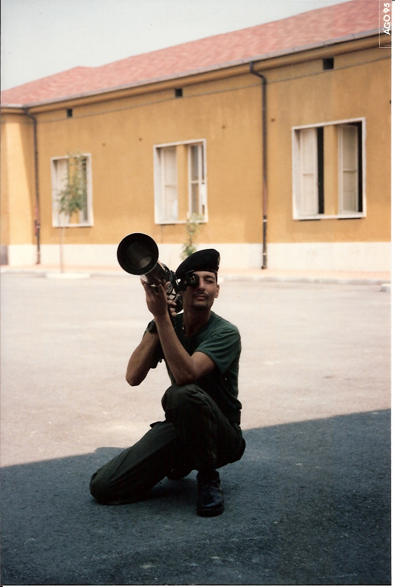 Graduato 84° Venezia con arma di reparto (Cocorocchio G.)